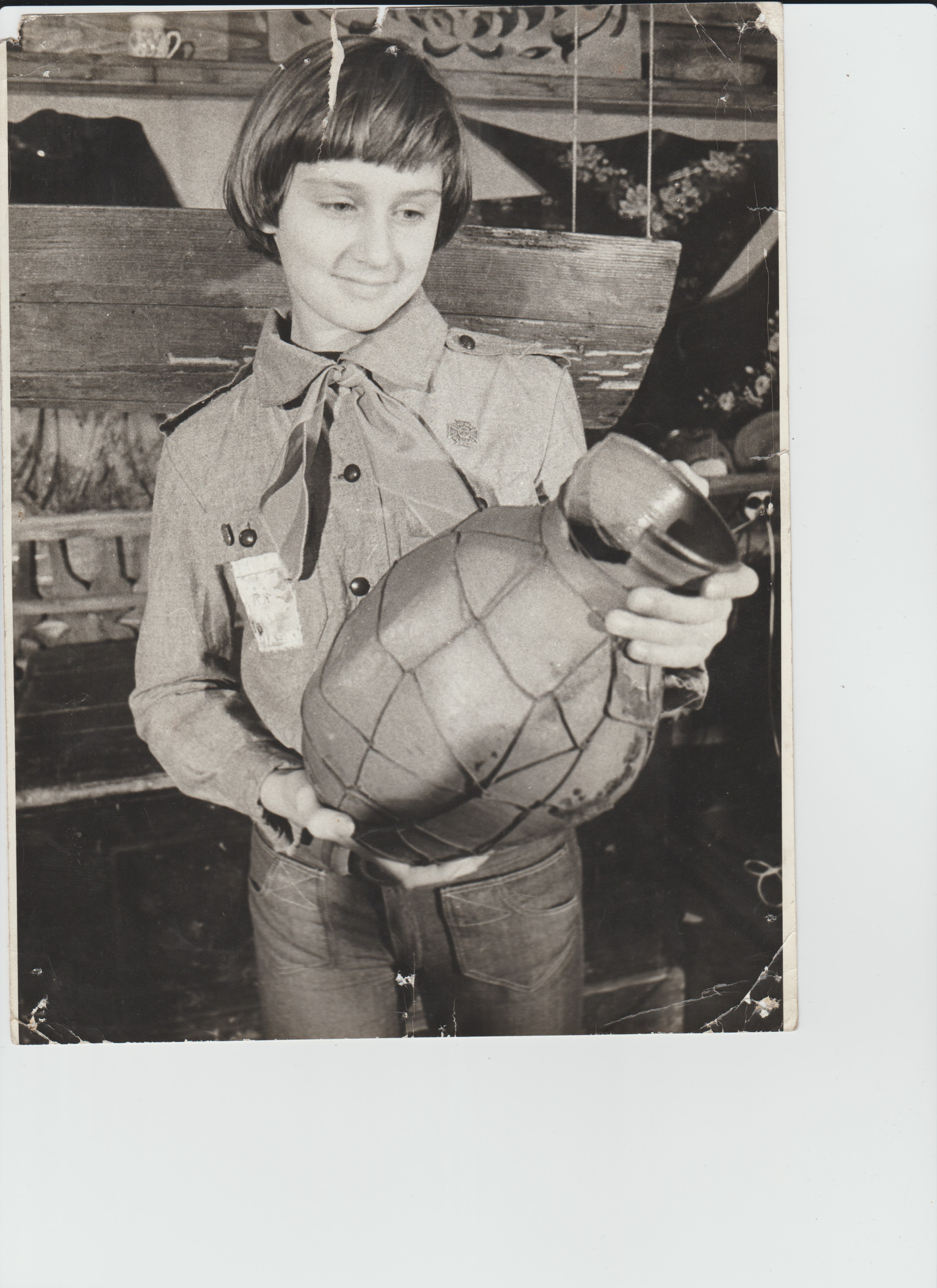 Skand zdjęcia przedstawiającego harcerkę zwiedzającą muzeum.